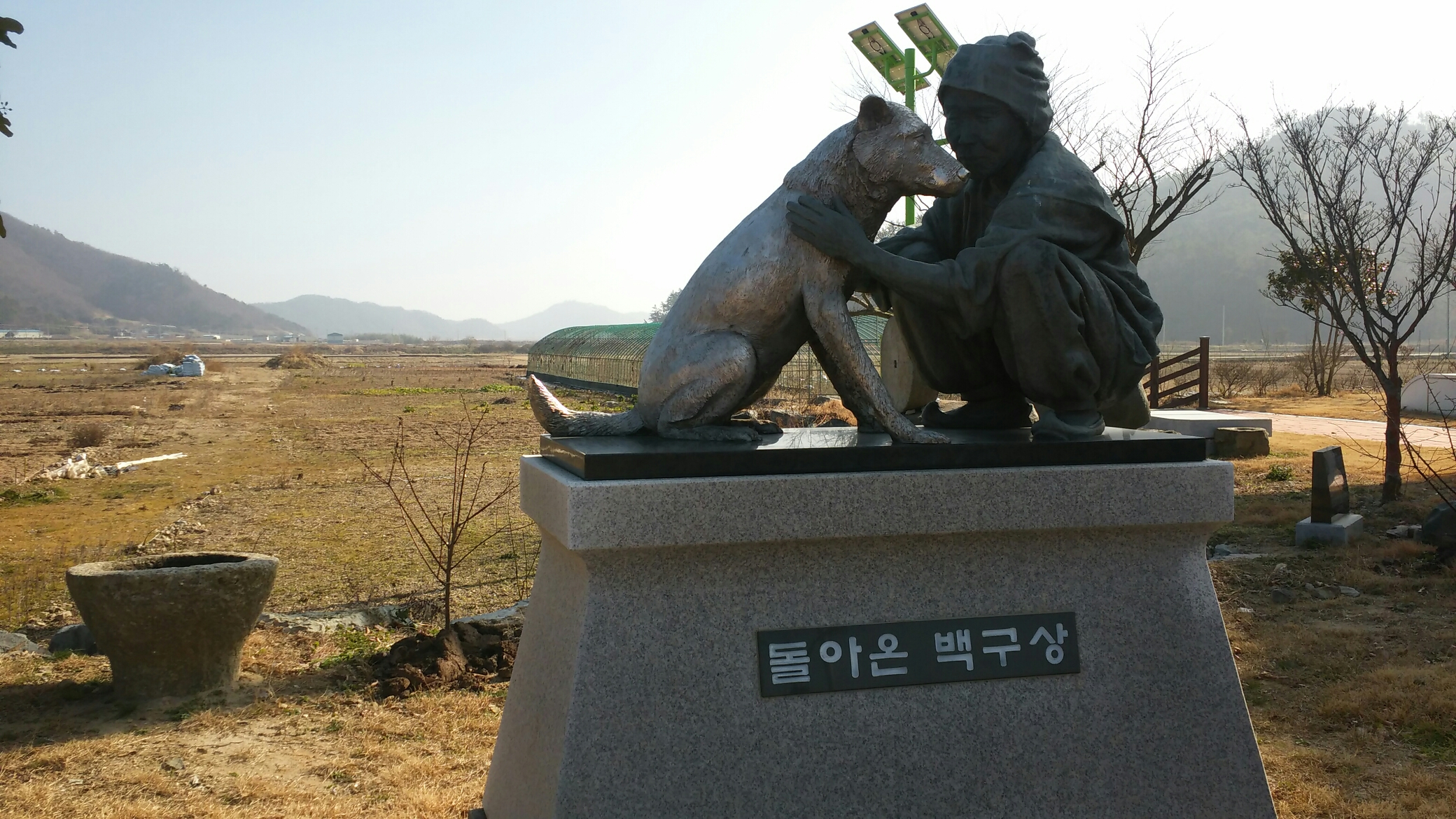 전라남도 진도군의 "돌아온 백구상"